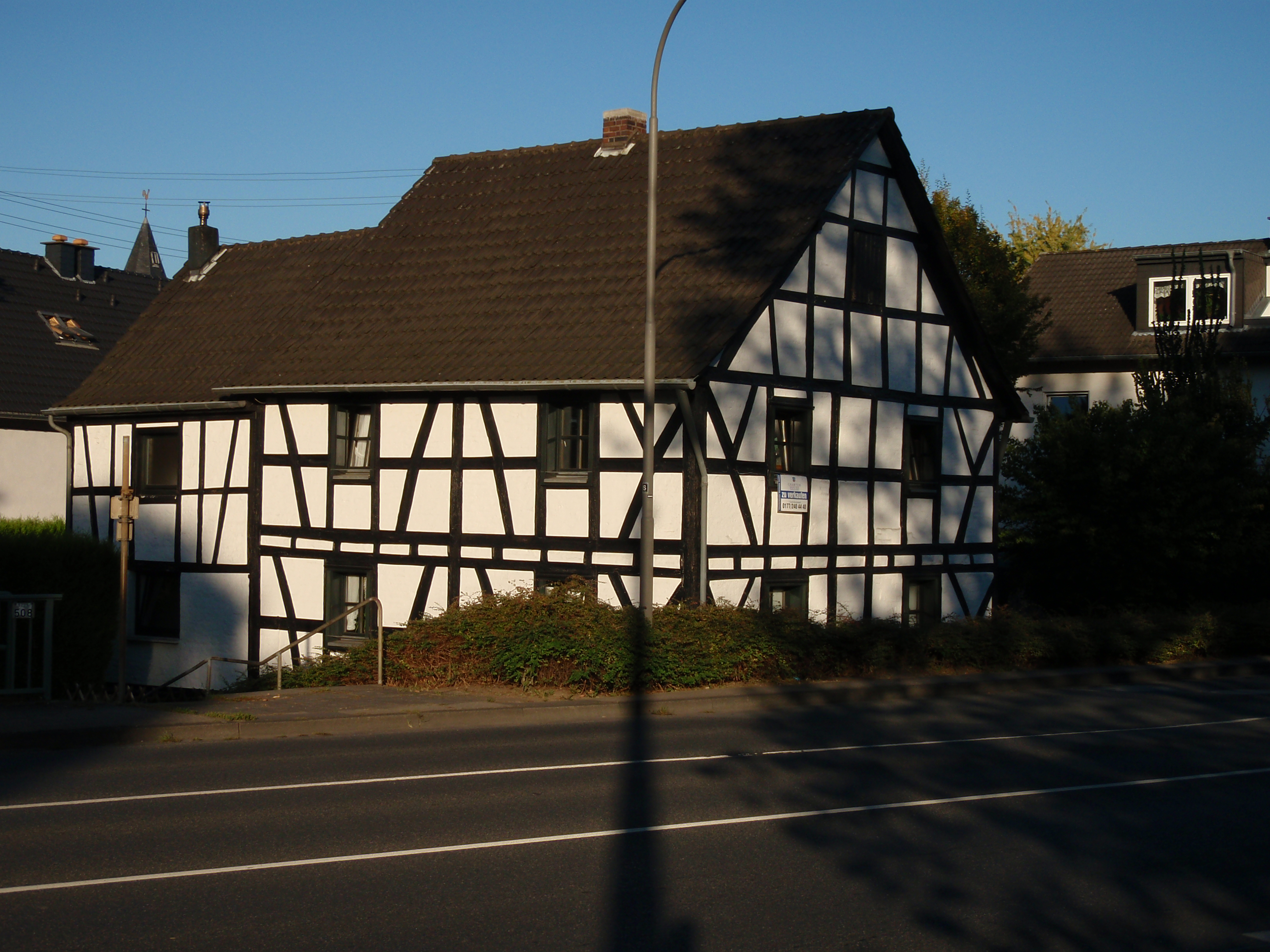 Foto des Gebäudes An der Kirche 11 in Sankt Augustin-Birlinghoven, Deutschland.